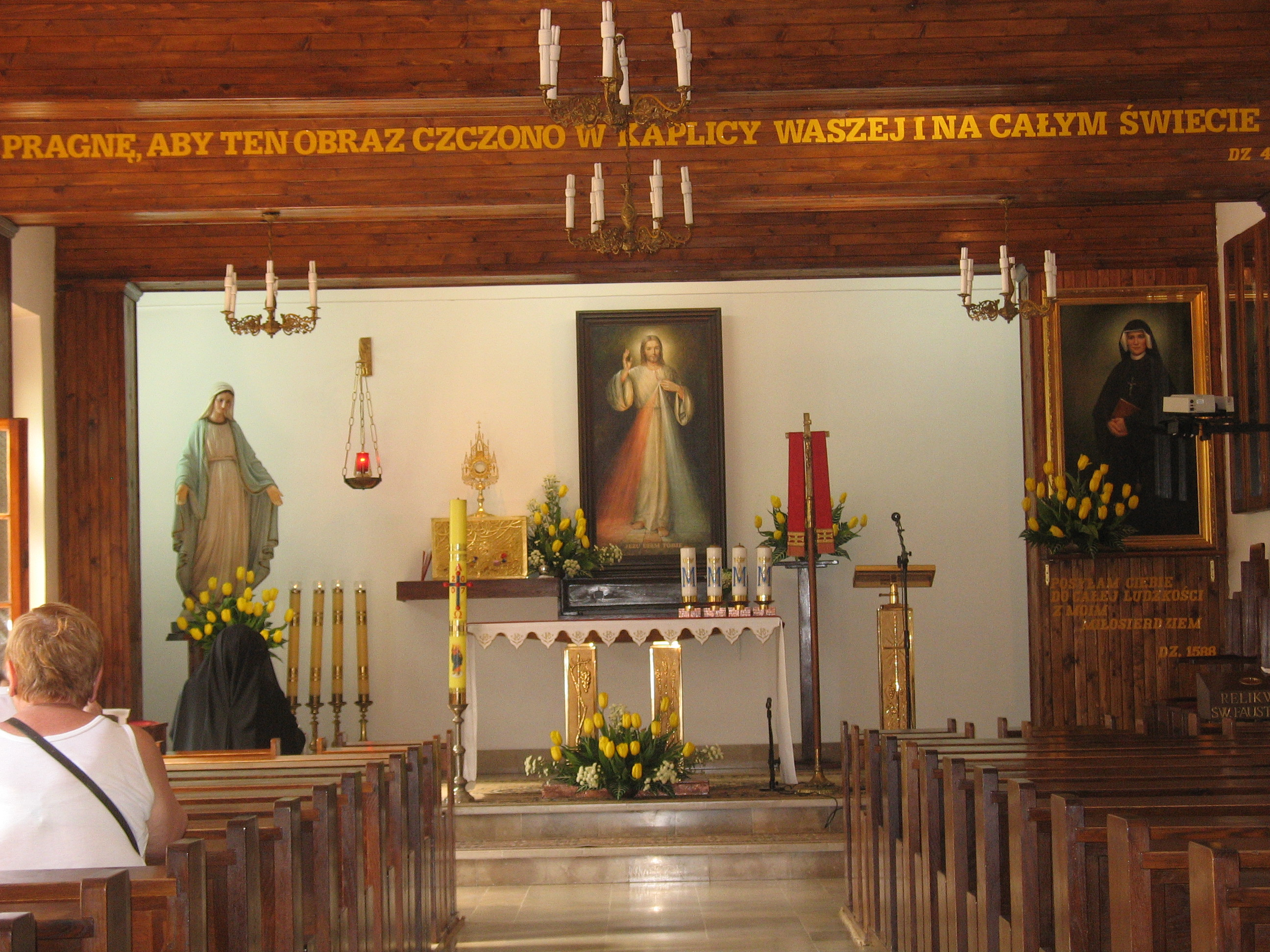 Wnętrze kaplicy sanktuarium Miłosierdzia Bożego w Płocku